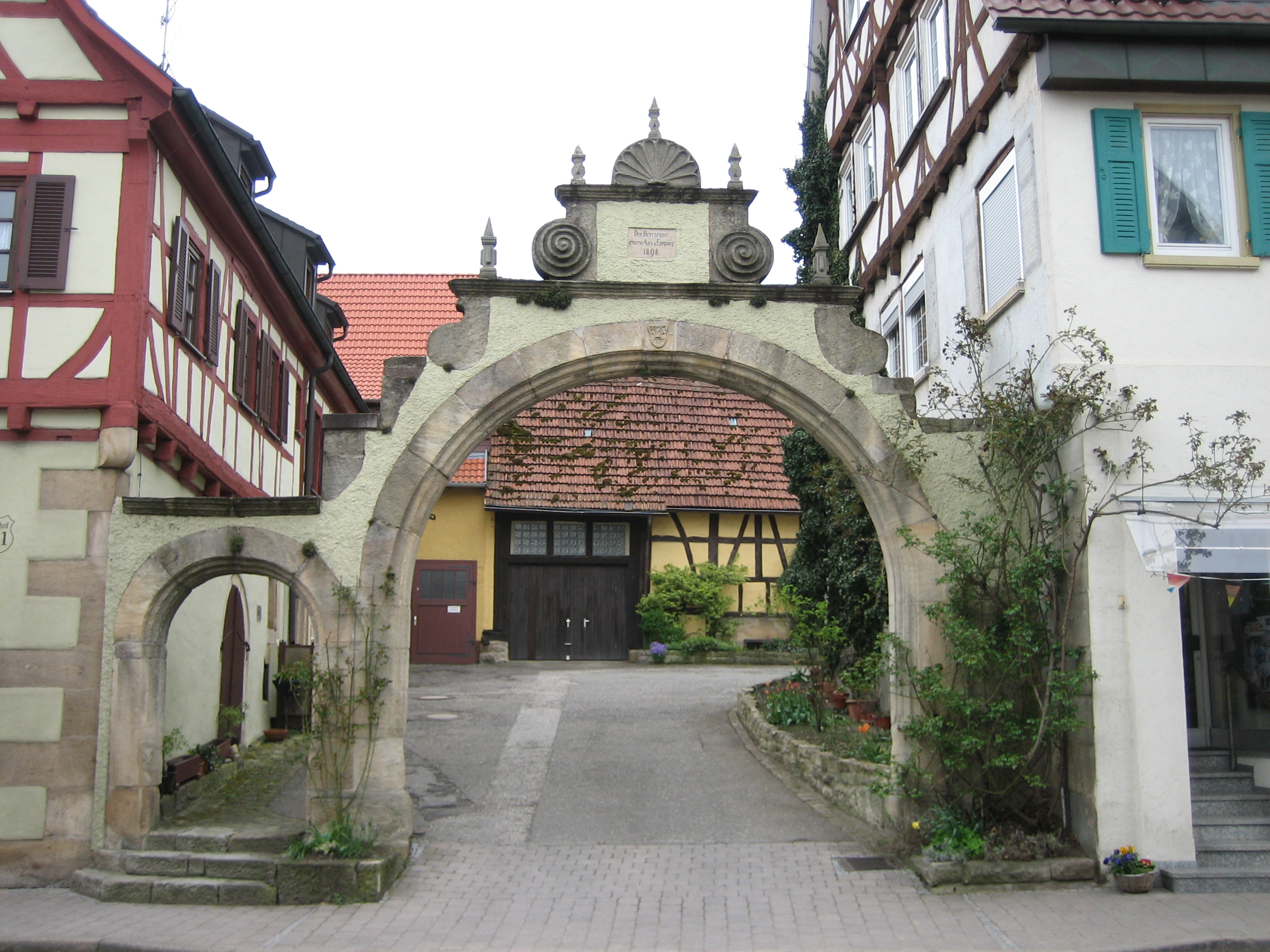 Walddorfhäslach Schlosshof Torbogen 1607